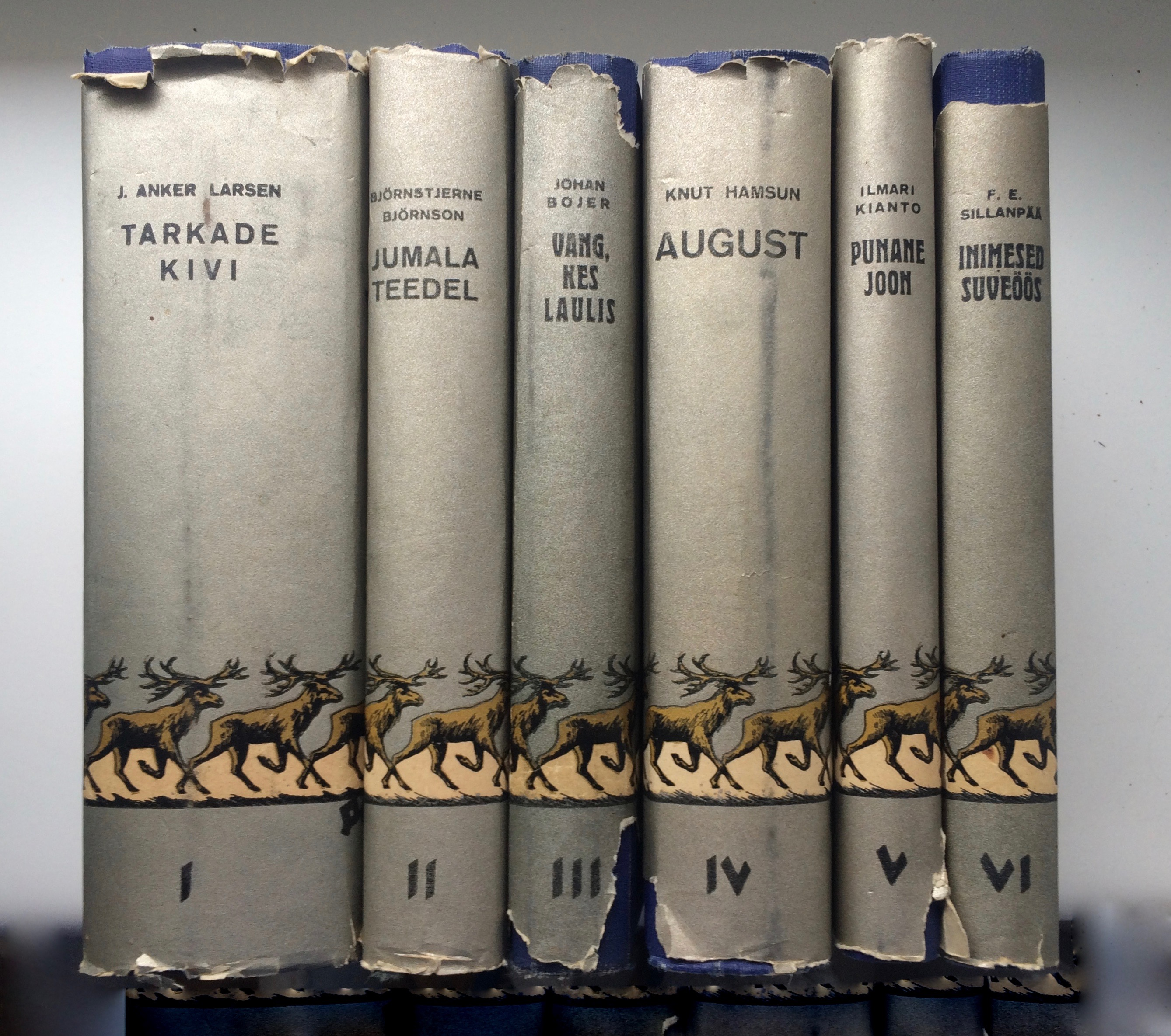 Raamatuseseljad